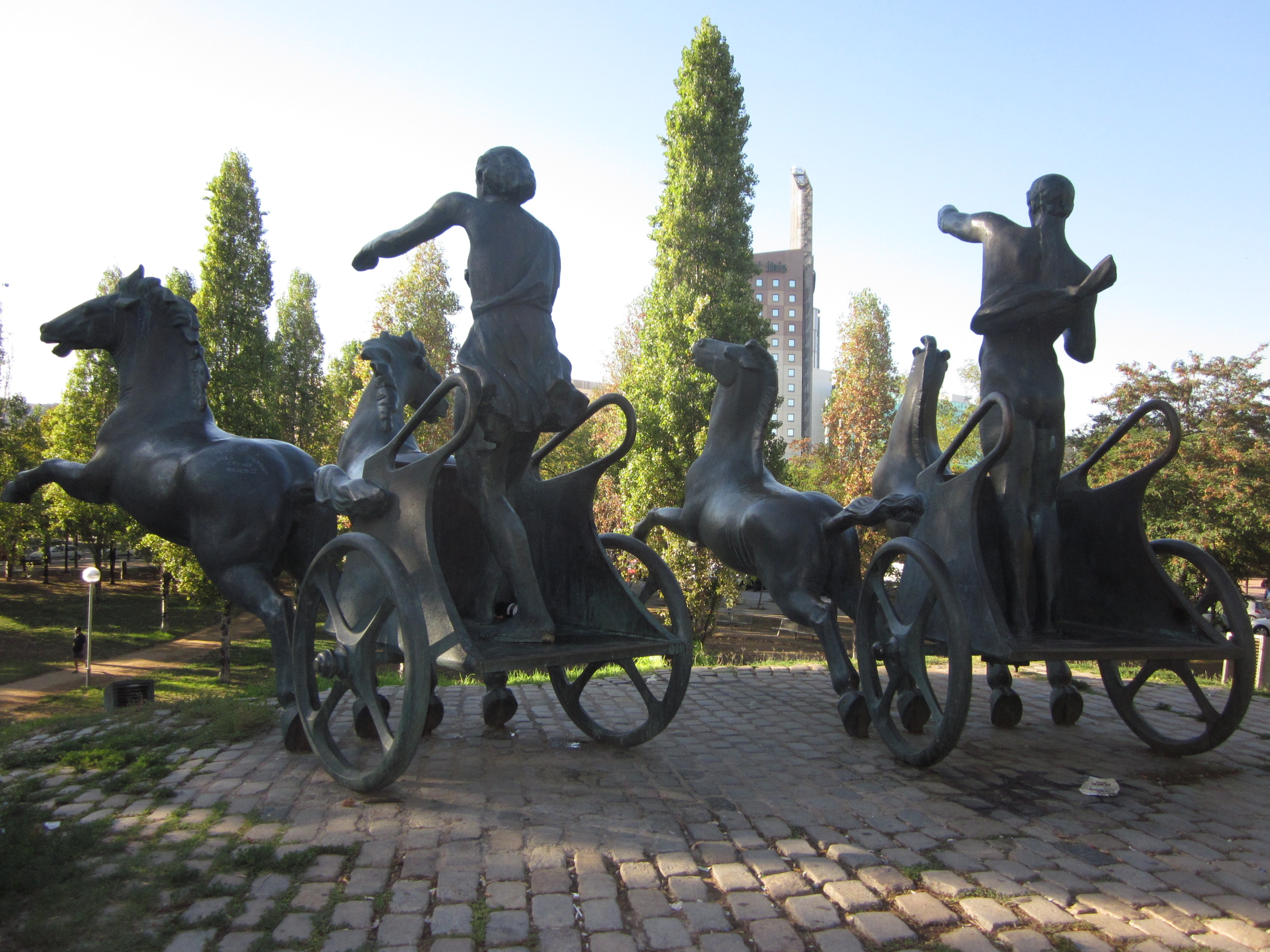 Réplica de la escultura Aurigas Olímpicas, de Pablo Gargallo, en el Parque de Can Dragó, Barcelona.